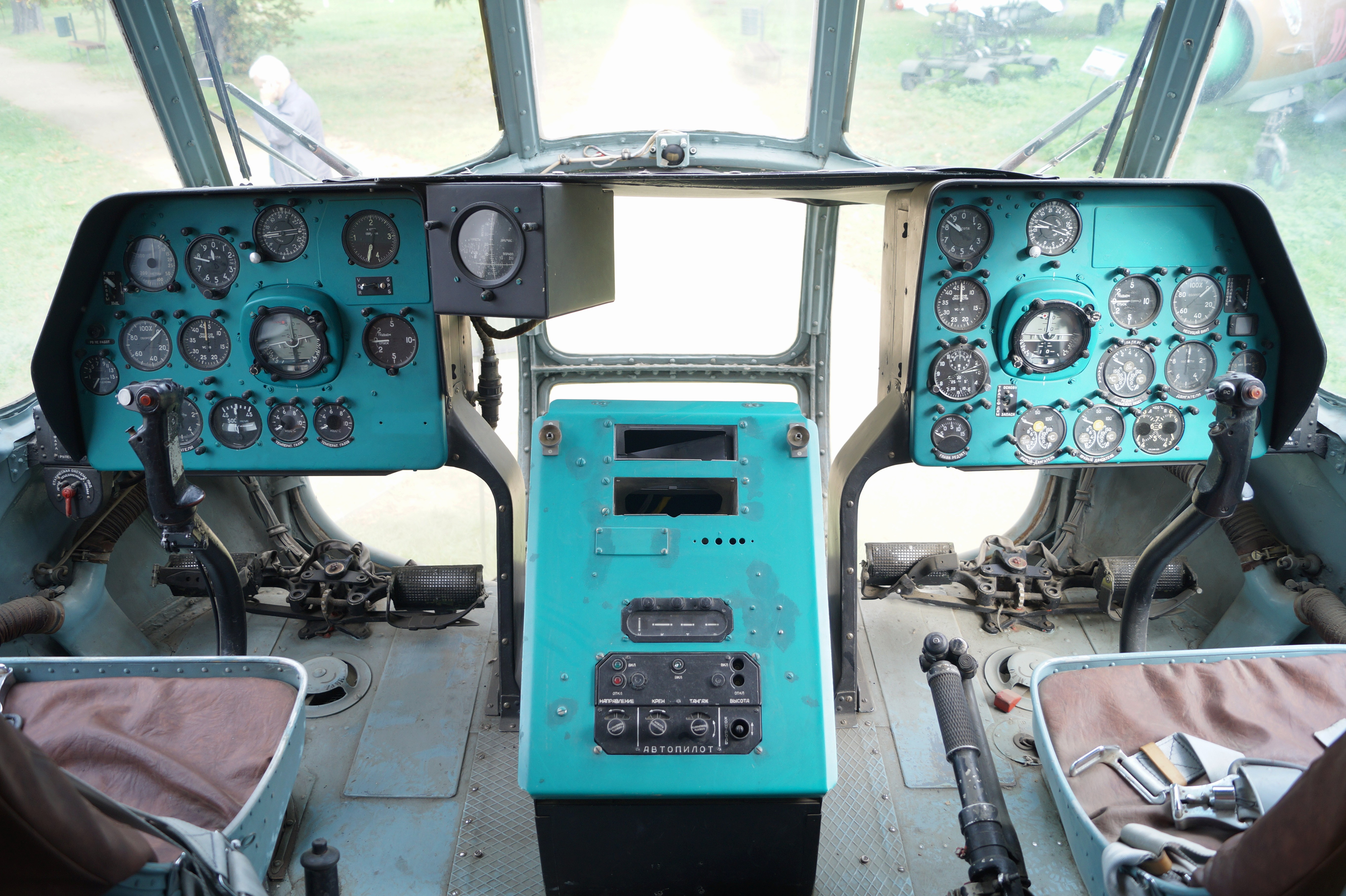 This photo was taken during Automotive Wikiexpedition 2016 set up by Wikimedia Polska Association. You can see all photographs in category Wikiekspedycja motoryzacyjna 2016. English | Polski | +/− Kokpit śmigłowca Mi-8 w Muzeum Lotnictwa Polskiego